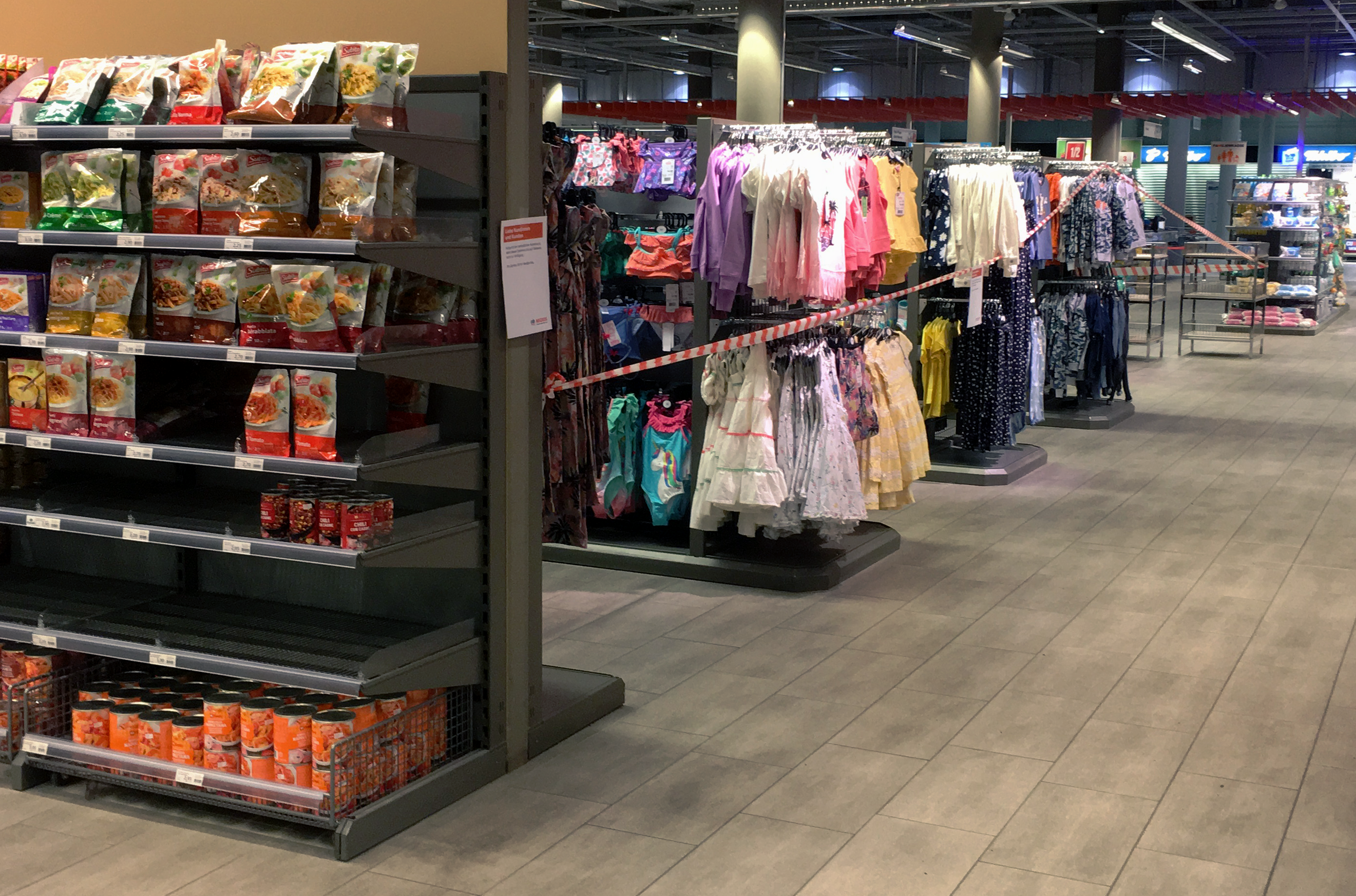 Leergekaufte Regale und abgesperrte Abteilungen in einer Migros-Filiale während der COVID-19-Pandemie.